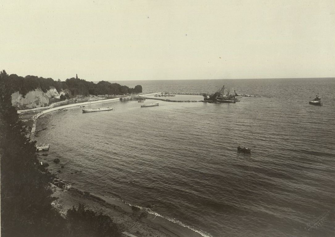 Снимка на целия залив при постройката на Евксиноградското пристанище.